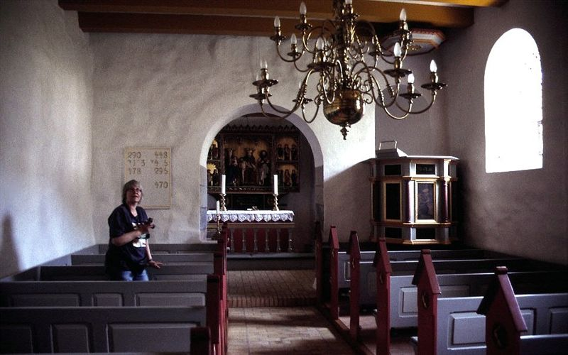 Komdrup Kirke i Danmark. Skibet set mod øst